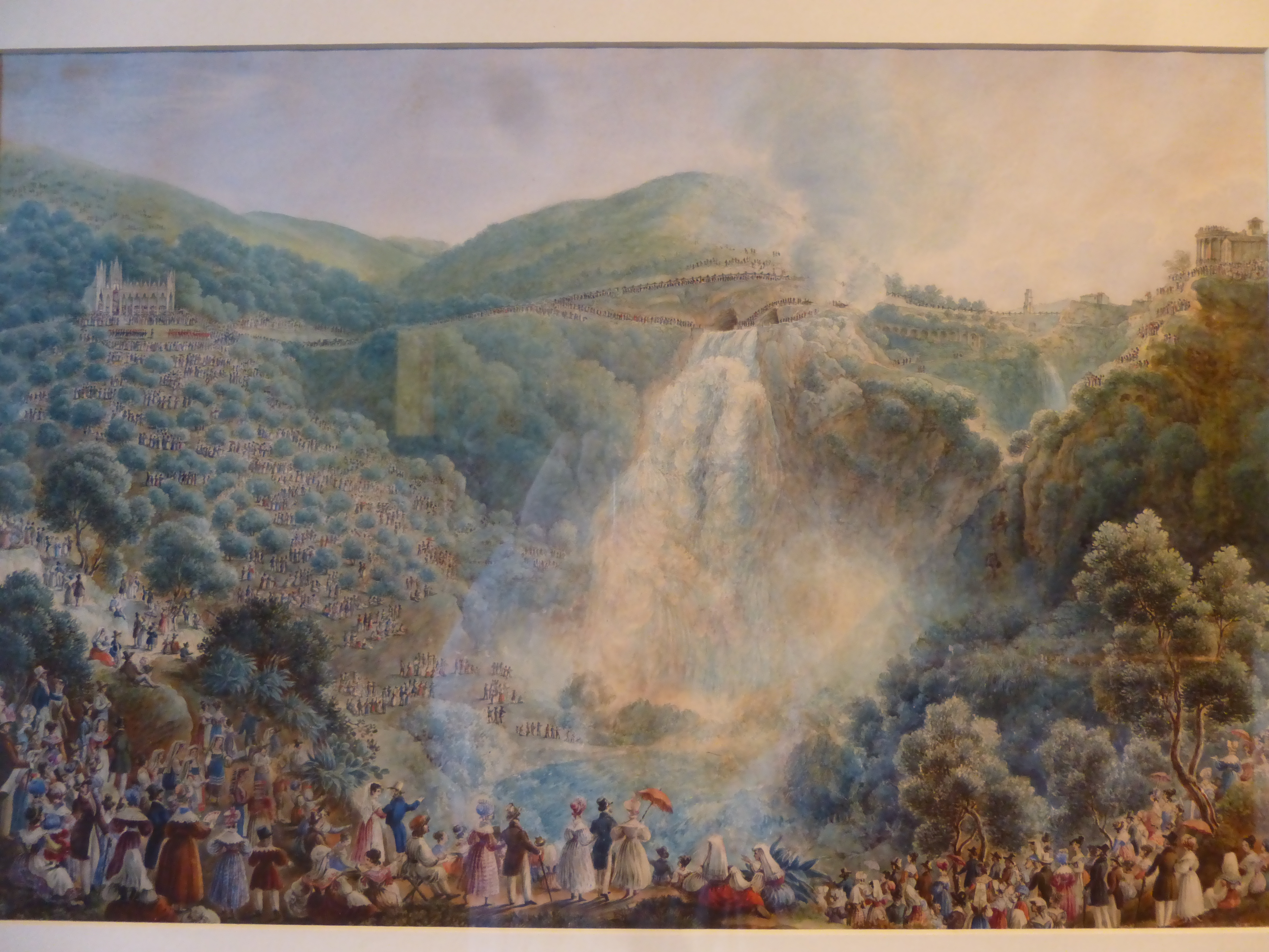 Museo di Roma a Palazzo Braschi. Tivoli, inaugurazione del traforo di monte Catillo e apertura dei cunicoli dell'Aniene, alla presenza di Gragorio XVI e con gran concorso di pubblico, il 7 ottobre 1835 (Giovanni Riveruzzi).